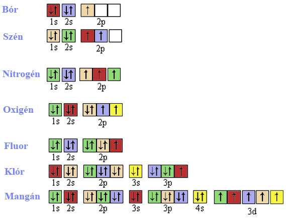 Elektron-konfigurációk